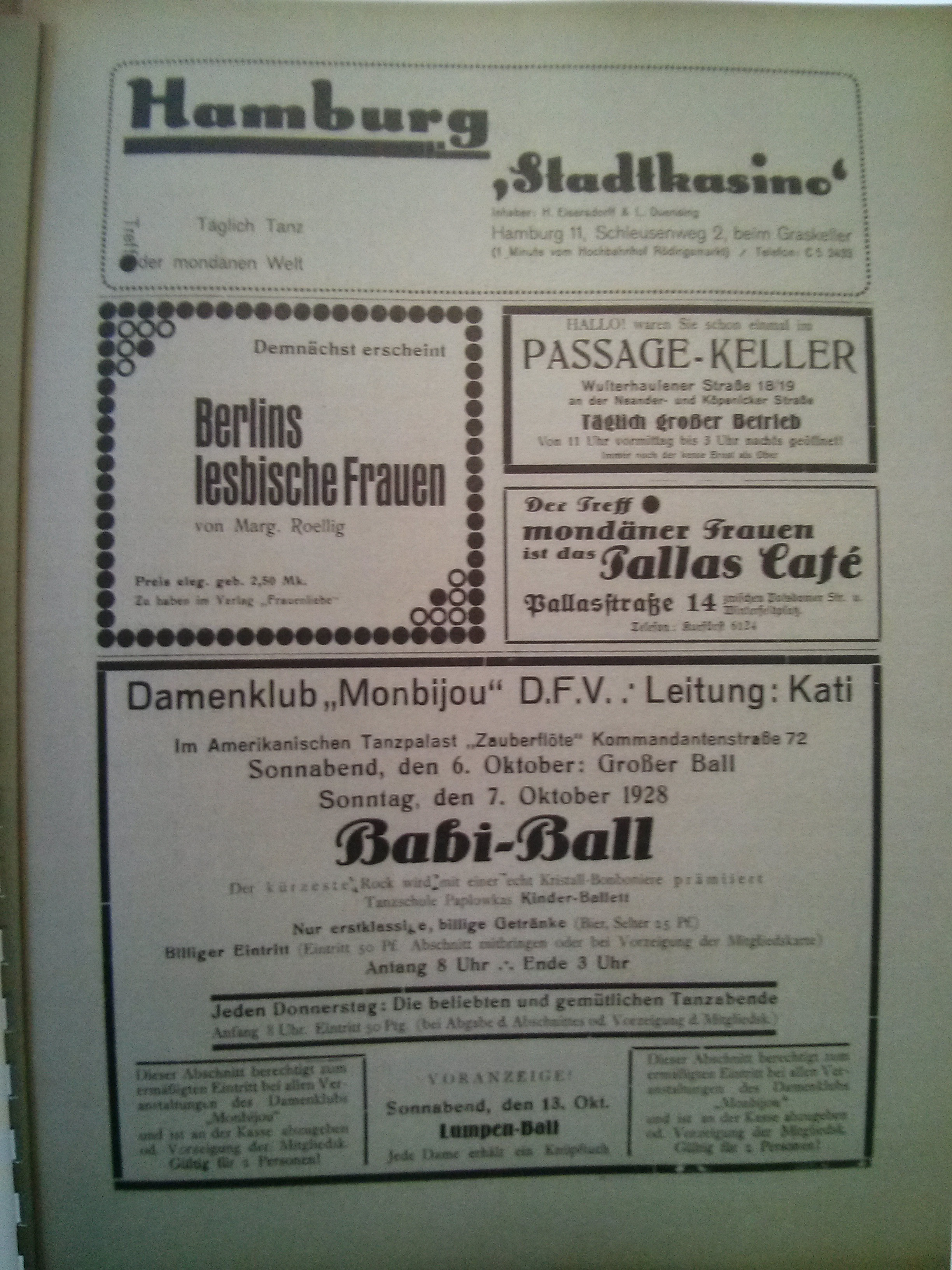 Aus der lesbischen Zeitschrift "Liebende Frauen", Berlin, 1928, Kleinanzeigenseite